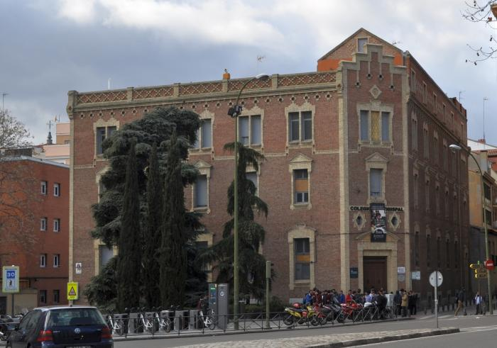 edificio